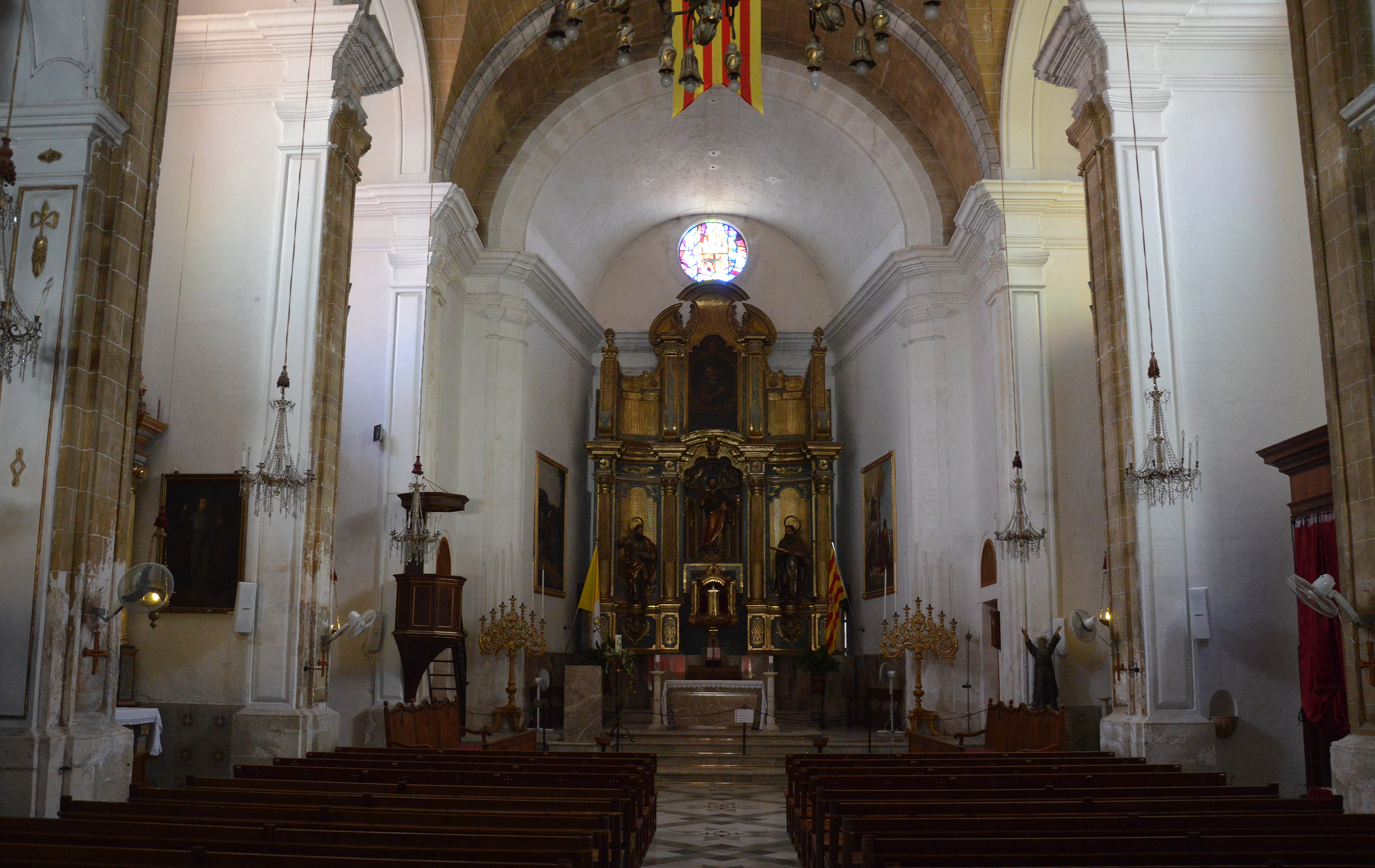 Kirche in Llubi Innen